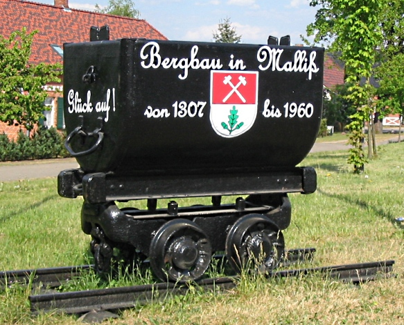 Denkmal in Form eines Huntes in Malliß, Mecklenburg-Vorpommern, Deutschland.